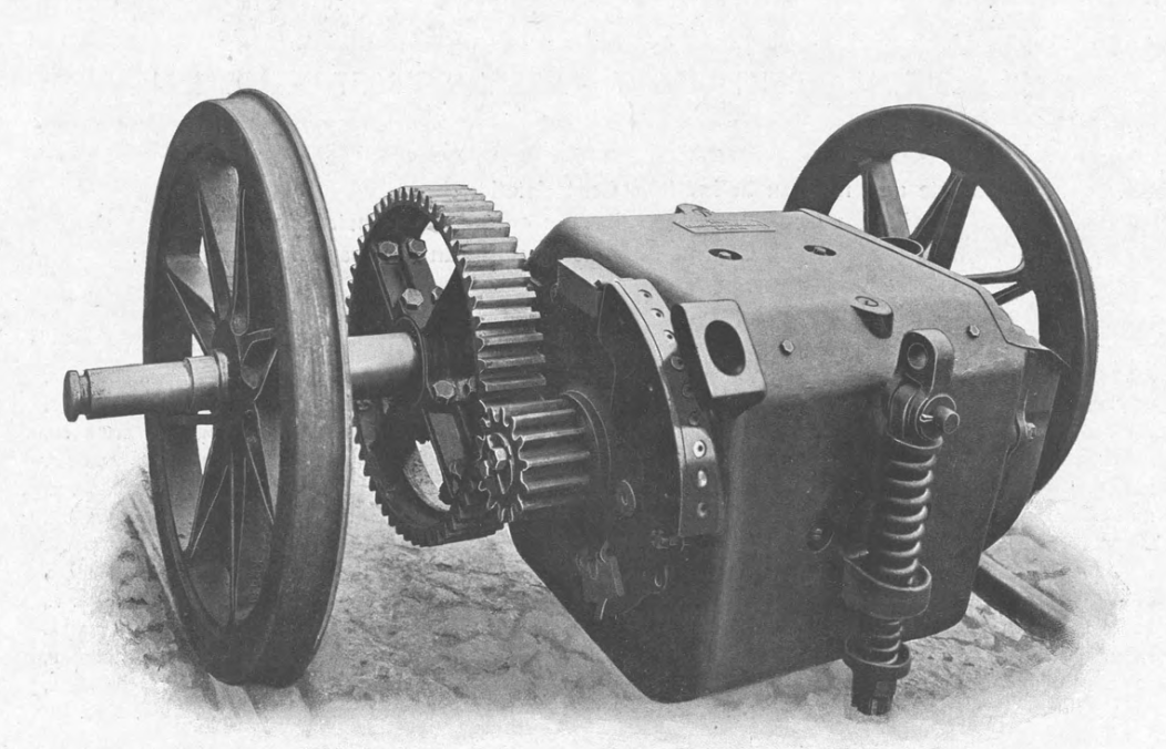 Strassenbahn-Motor. Tatzlagerantrieb einer Strassenbahn von AEG, ca. 1899